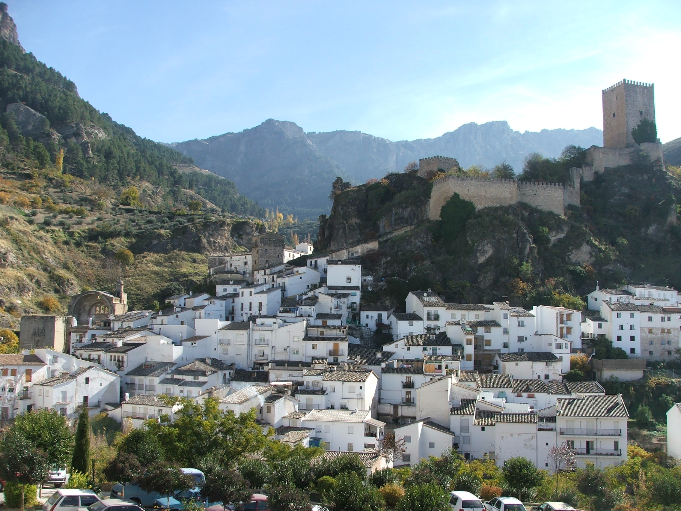 Cazorla: Vista del Barrio de Santa María y el Castillo de la Yedra.